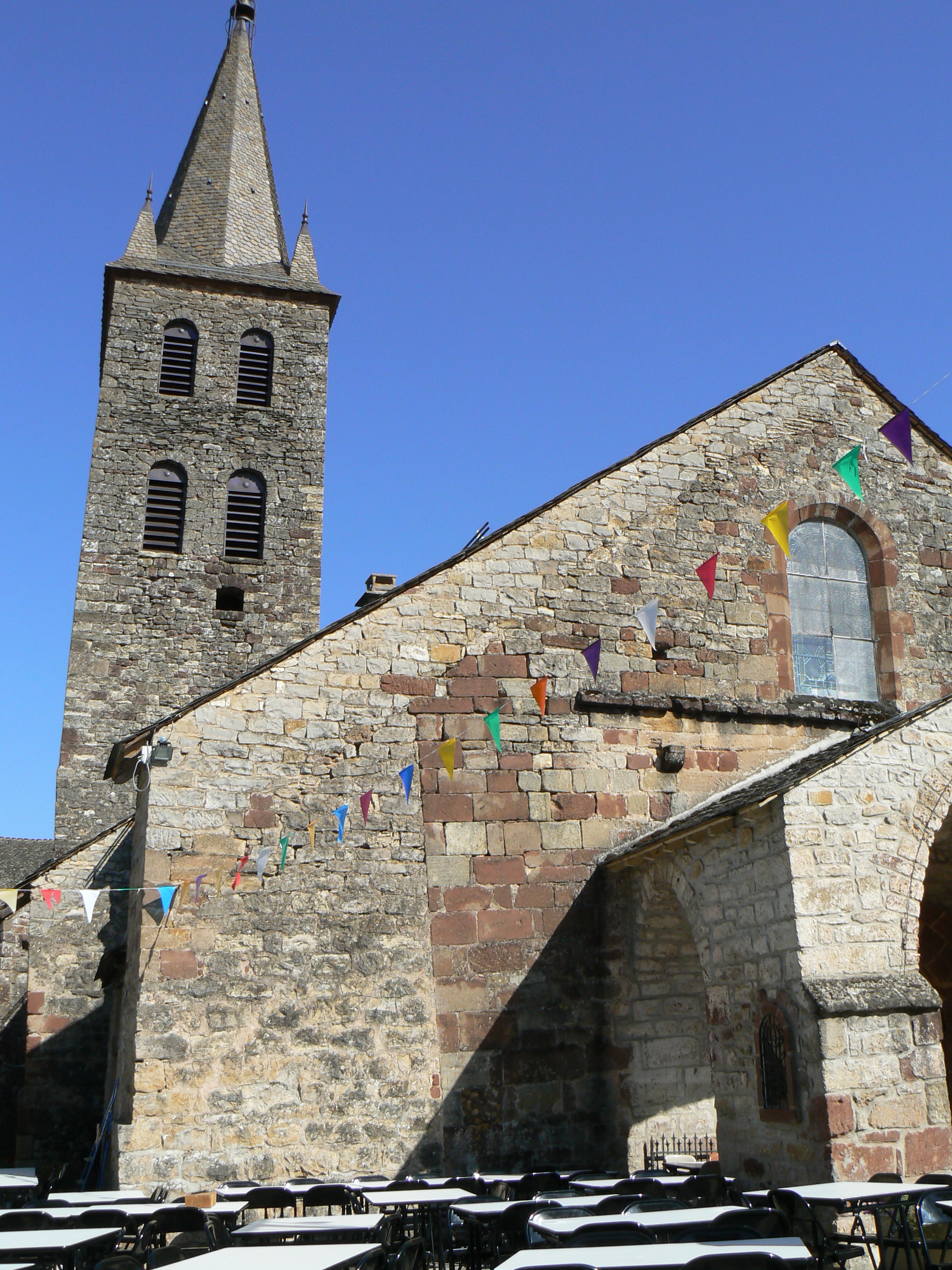 Eglise de Banassac, vue extérieure.